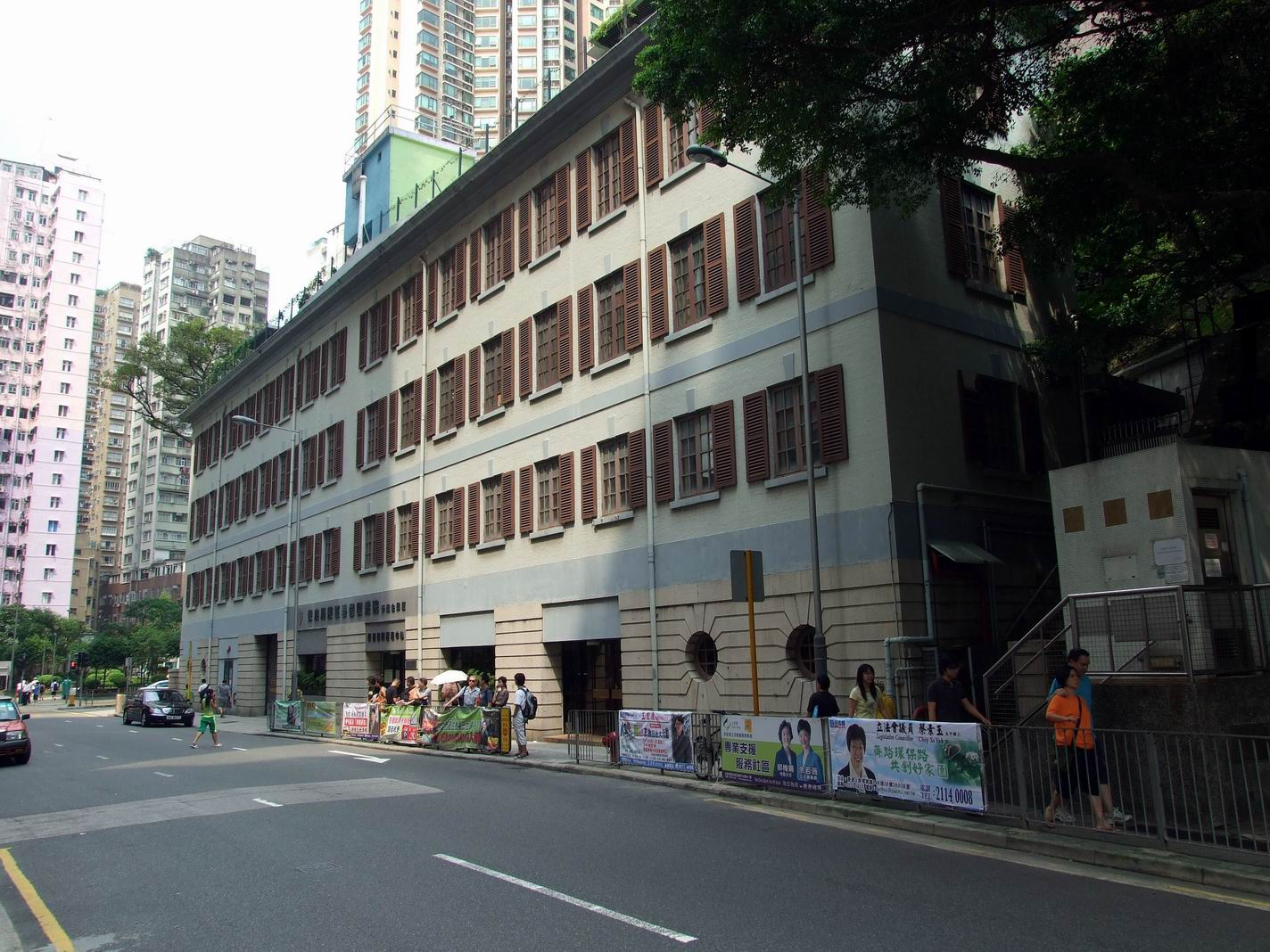 前西區消防局